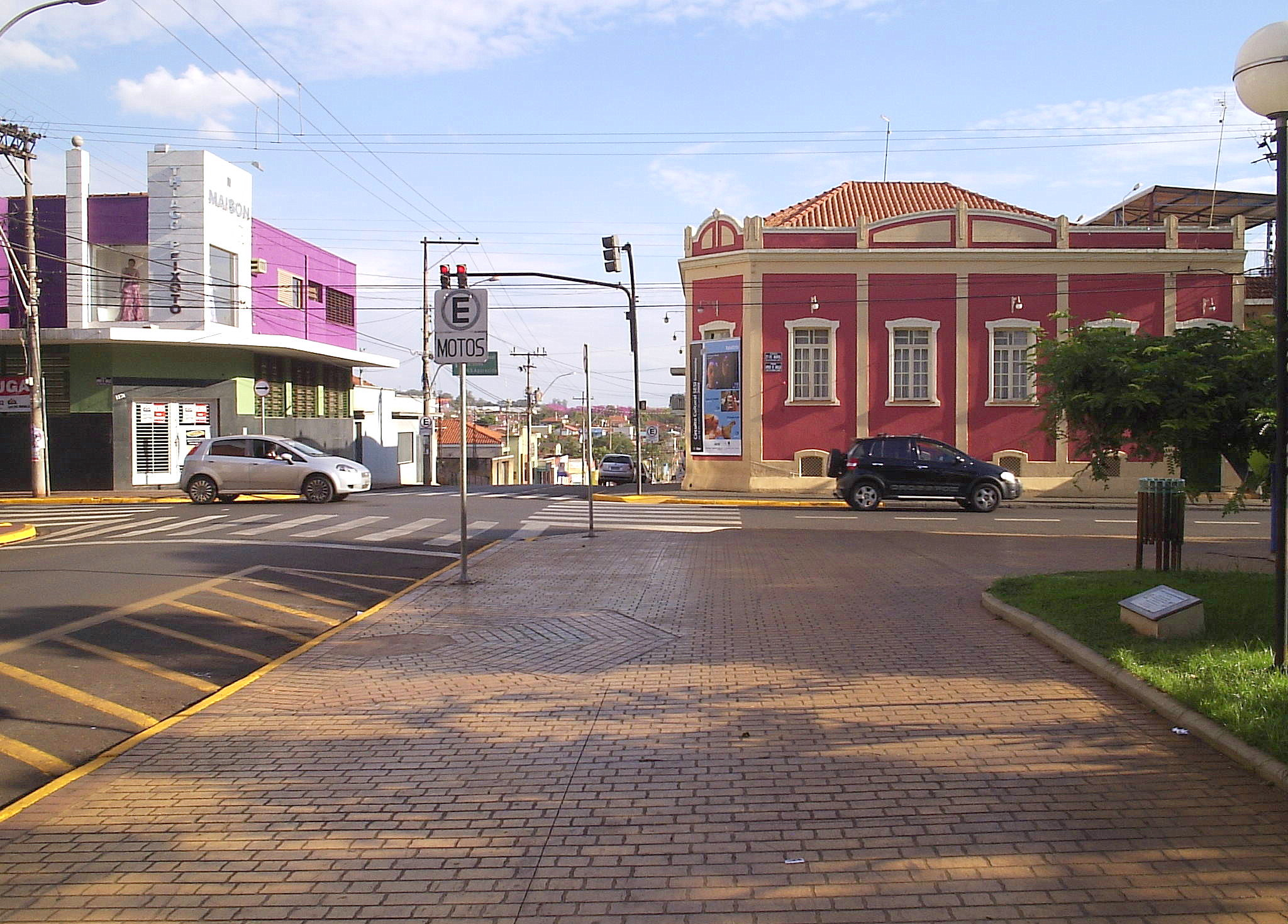 Biblioteca Municipal de Sertãozinho